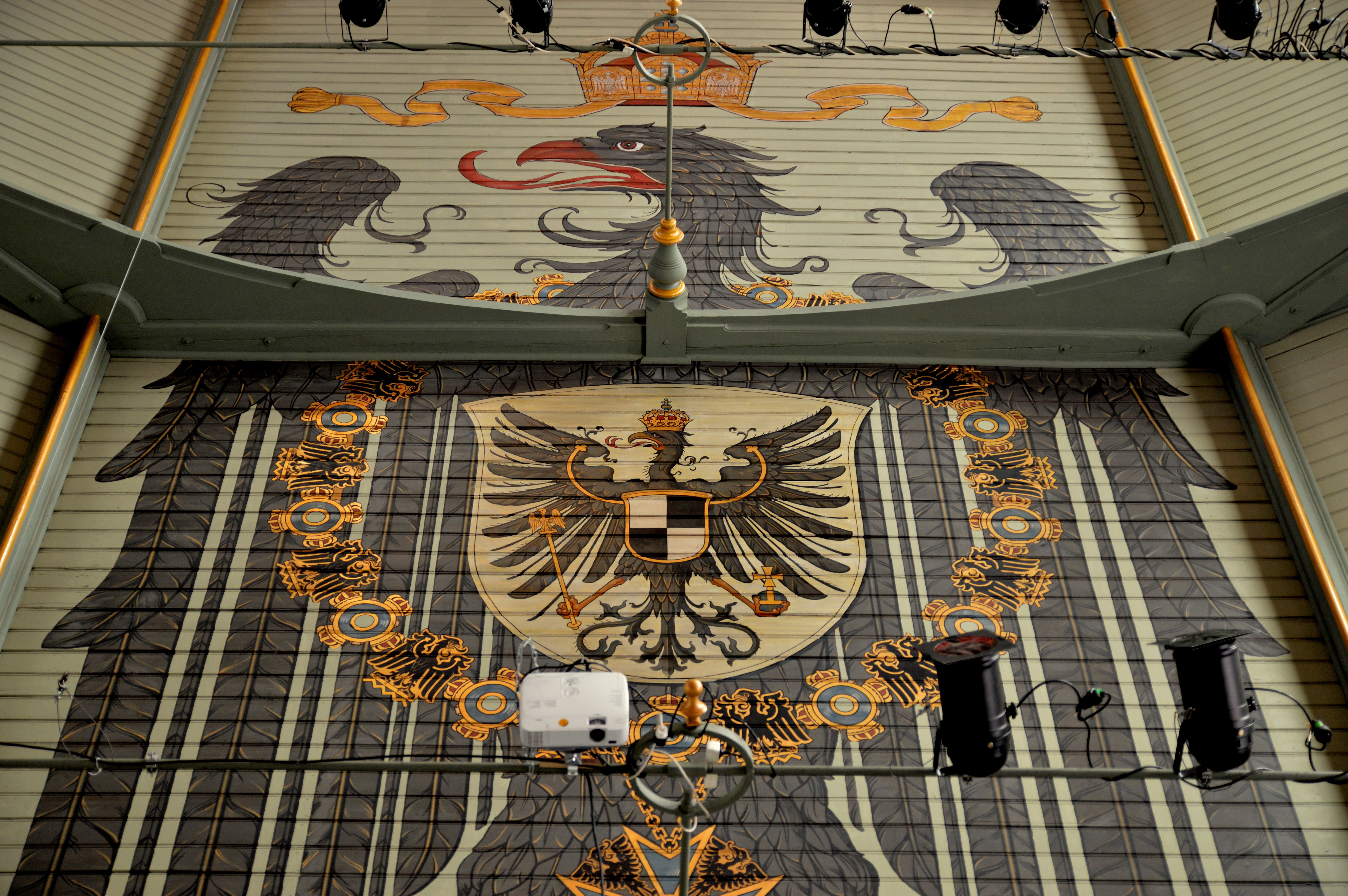 Fotografie Friedrich-Gymnasium Freiburg (im Breisgau) [FG] im Stadtteil Herdern